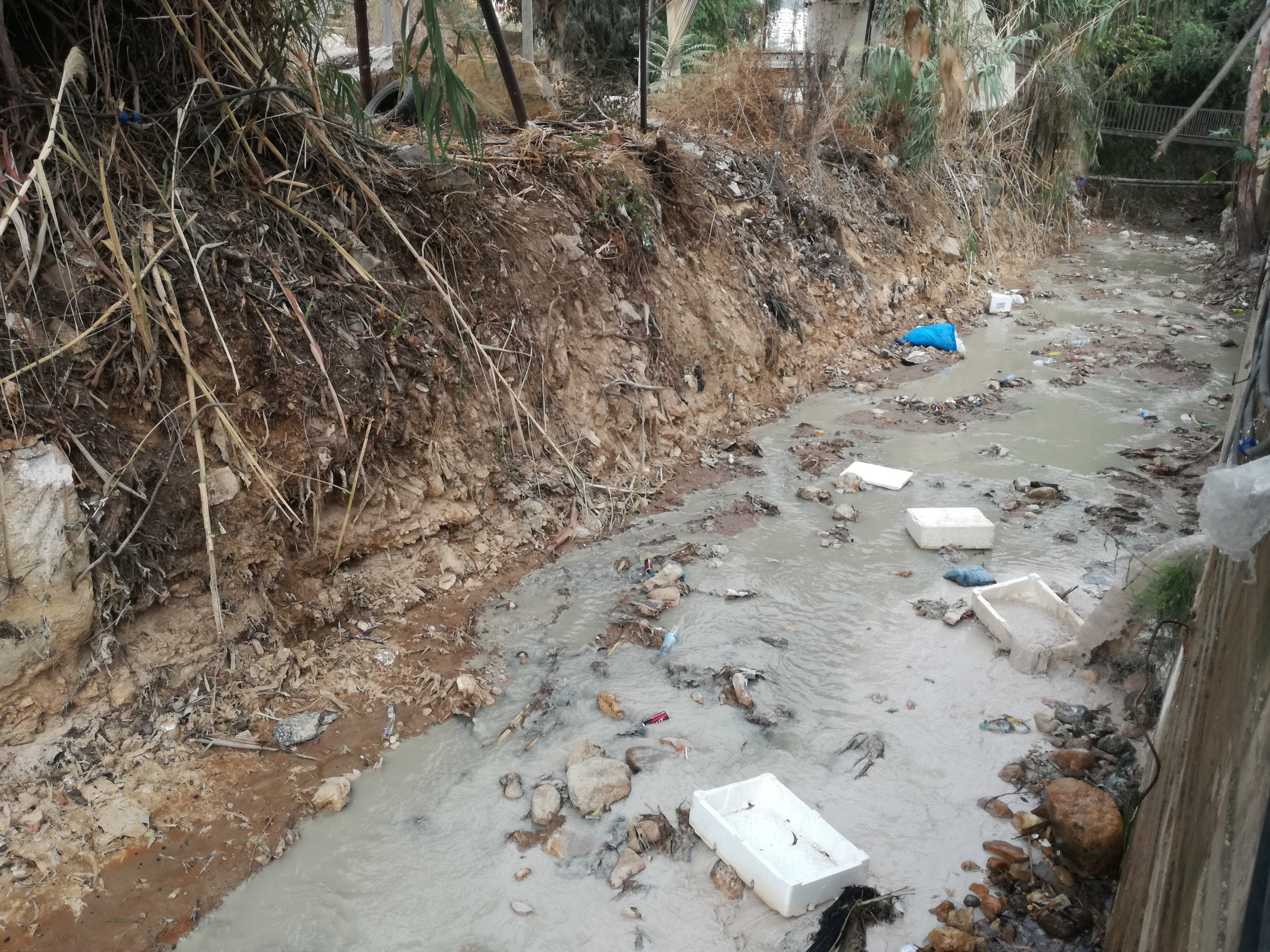 مجرى نهر الغدير، وبه الكثير من النفايات